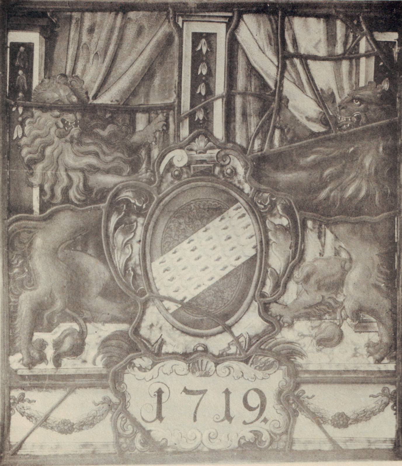 Die Kürschnern-Zunft zu Basel Wappenscheibe aus dem ersten Stock des Zunfthauses